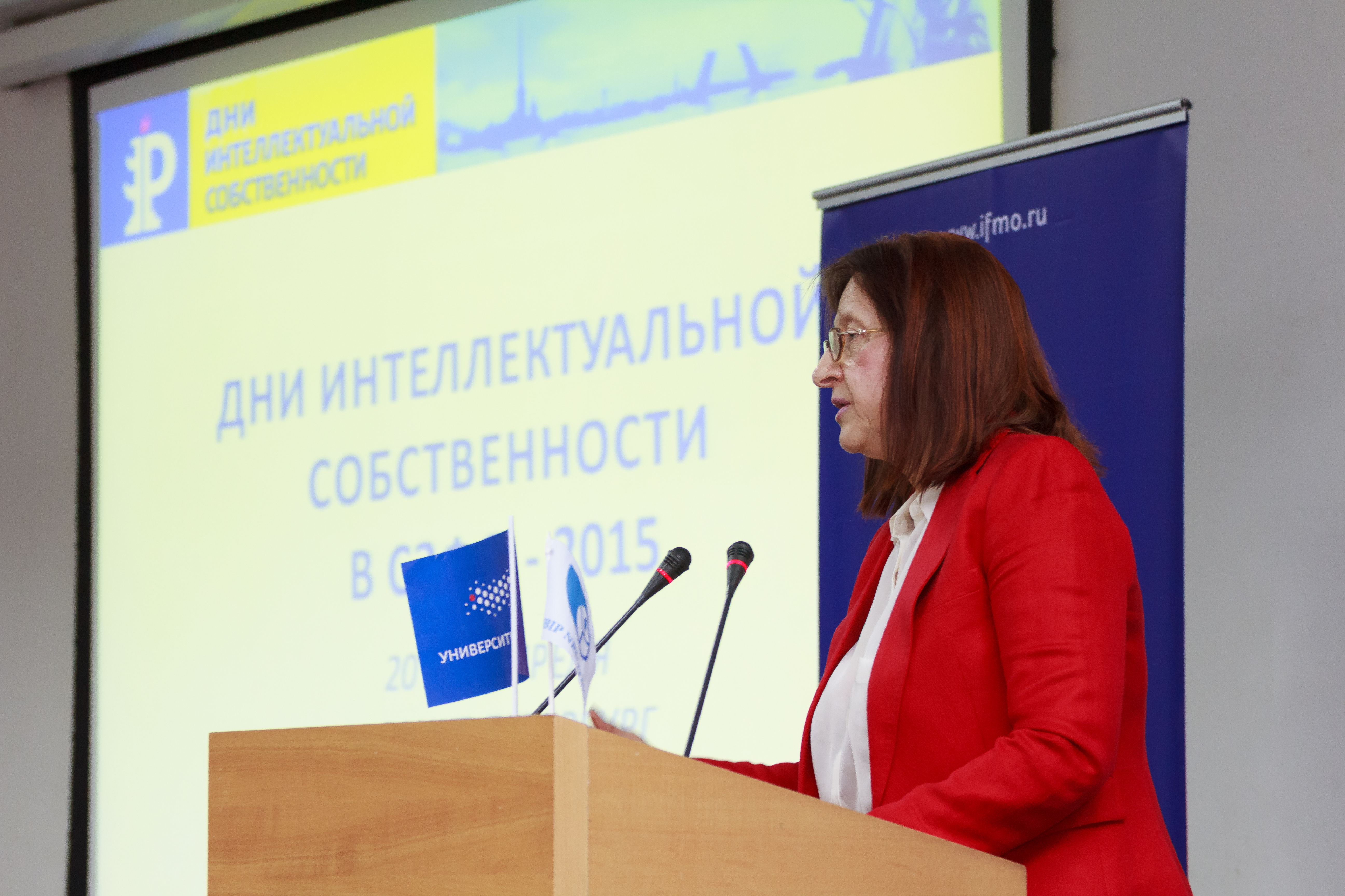 Дни интеллектуальной собственности на факультете ИМБИП Университета ИТМО